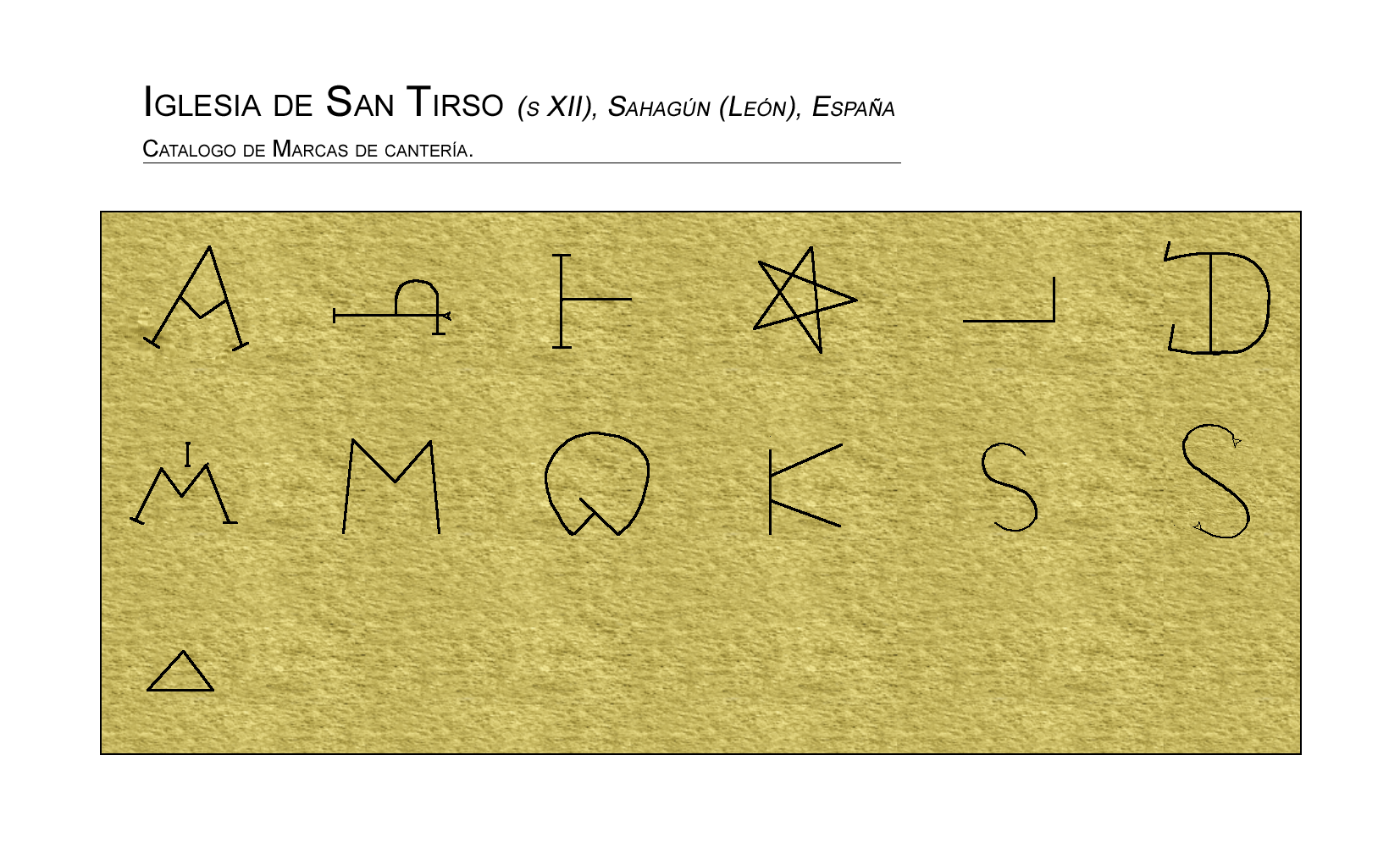 Catalogo de Marcas de cantería; Ig. de San Tirso, Sahagún (León), España.